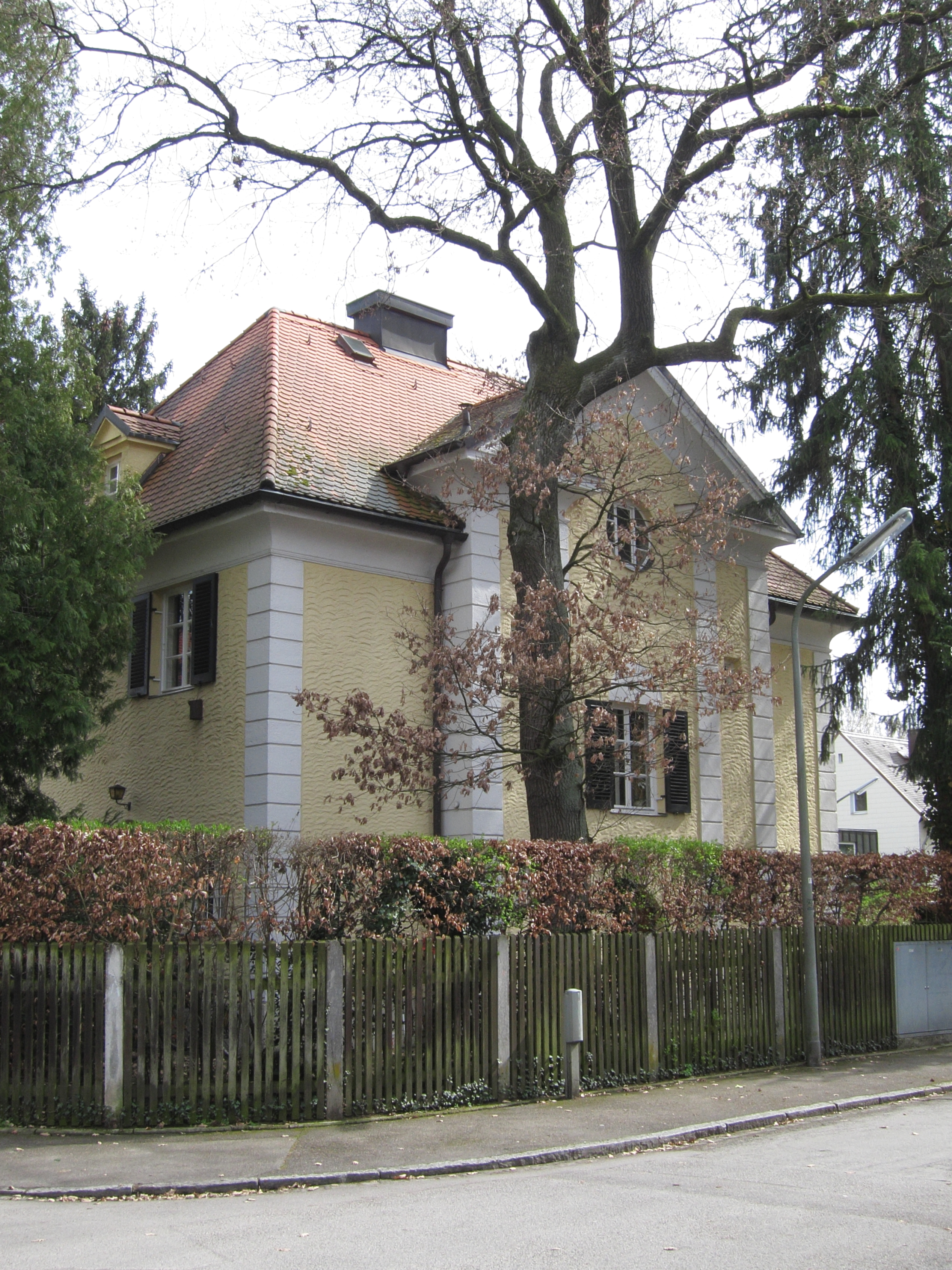 Lichtingerstraße 21; Villa, klassizisierender Walmdachbau, 1922 von Oskar Delisle und Bernhard Ingwersen.